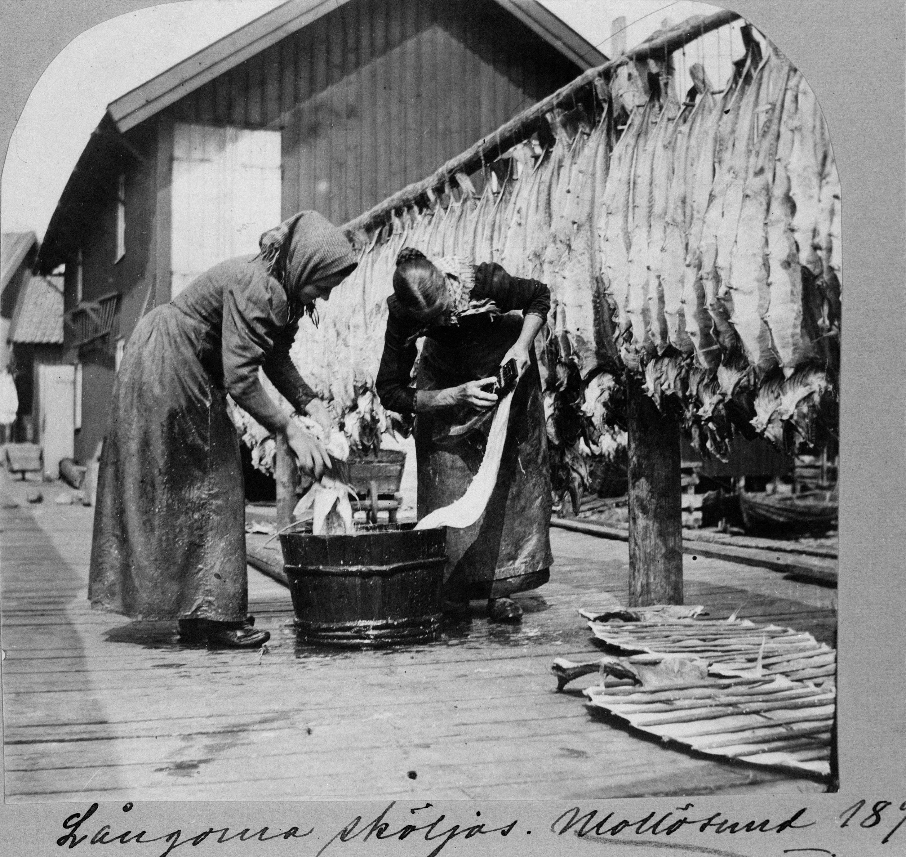 Två kvinnor sköljer långor i träkar. Bohuslän, Mollösunds fiskeläge, Orust, Morlanda socken, Mollösunds kapellförsamling.